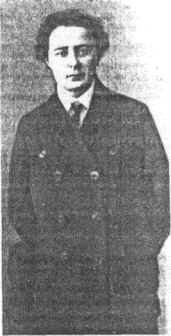 Photographie de la princesse Vera Gedroitz